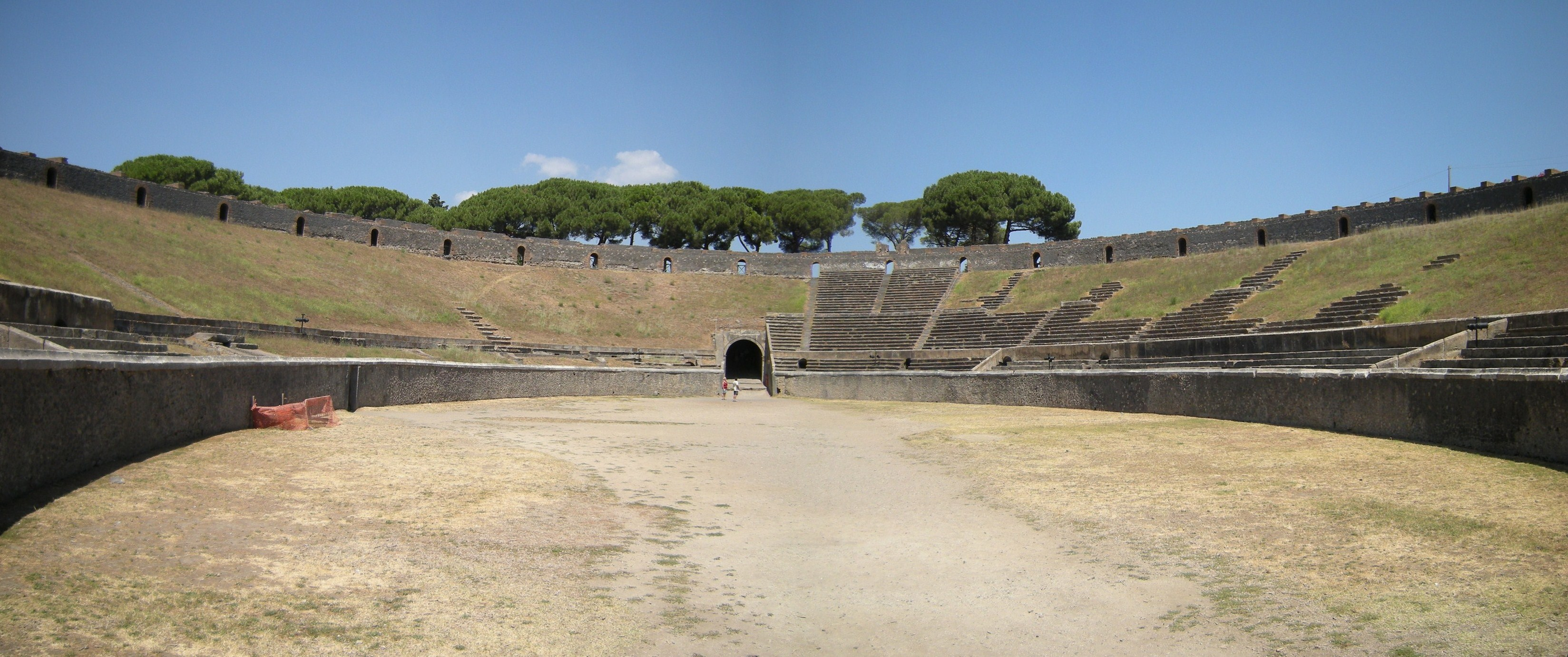 Sítio Arqueológico de Pompéia